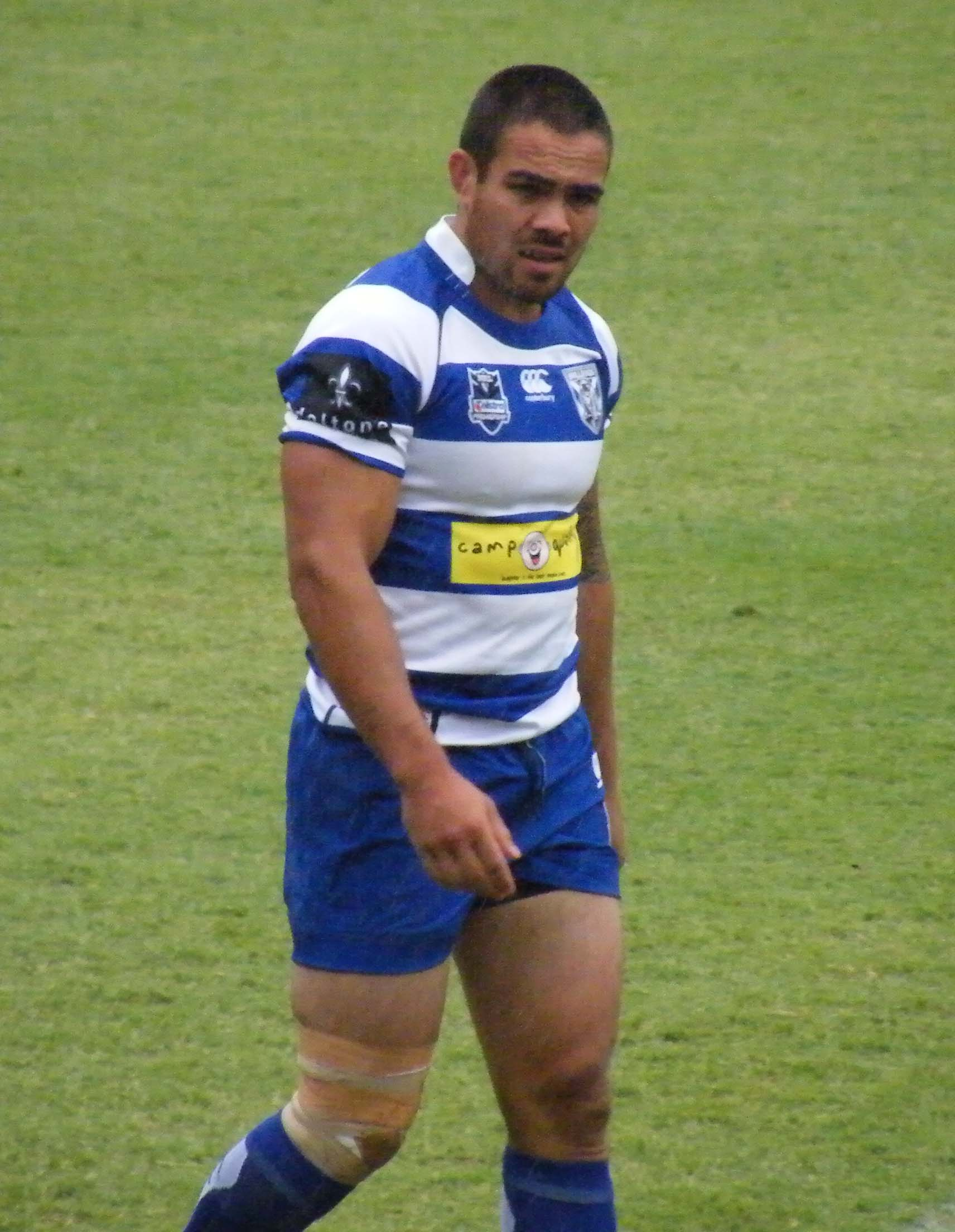 Dene halatau